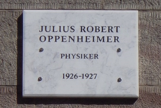 Göttinger Gedenktafel für Julius Robert Oppenheimer (Am Geismartor 4)